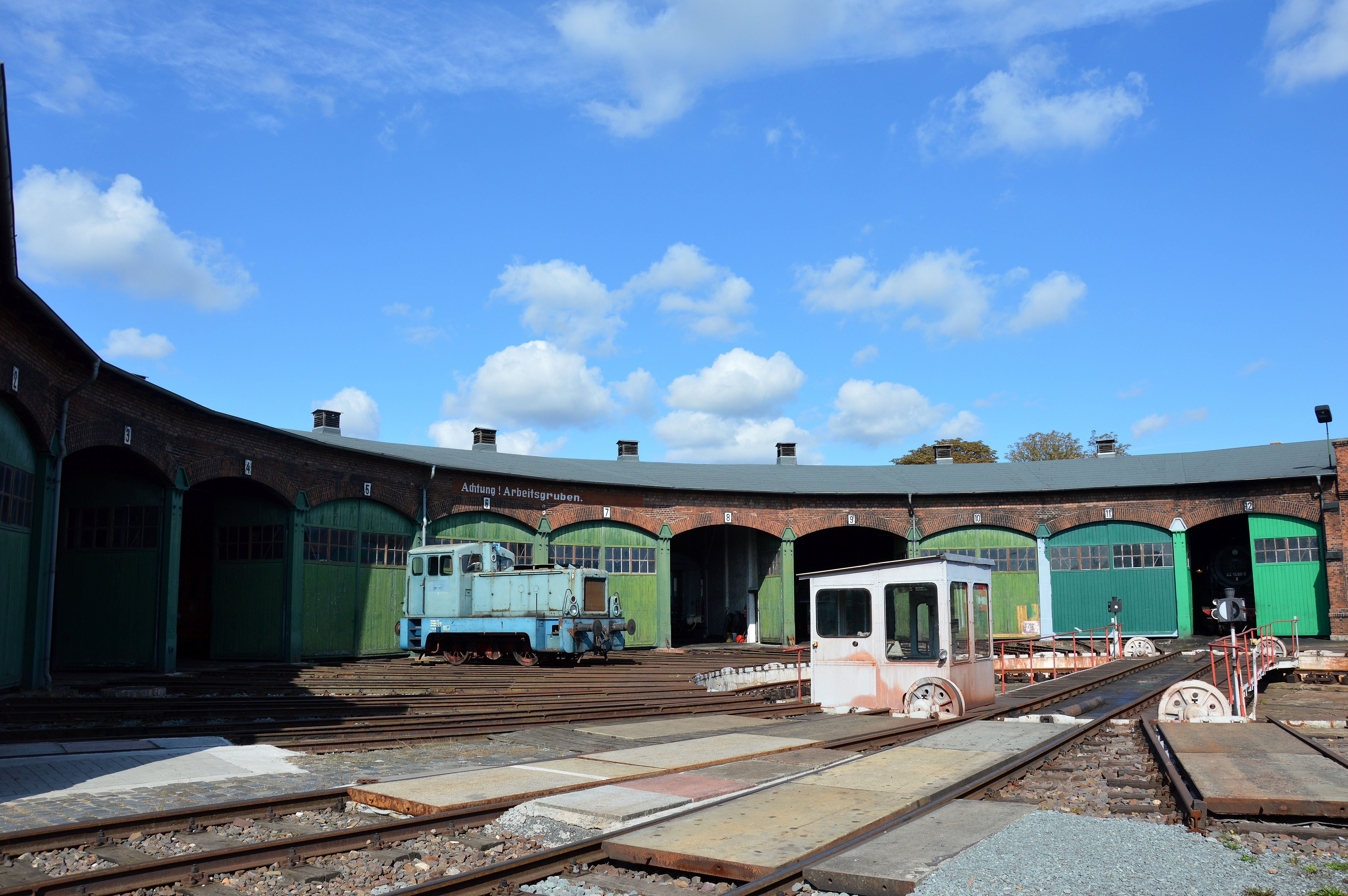 Ringlokschuppen Staßfurt